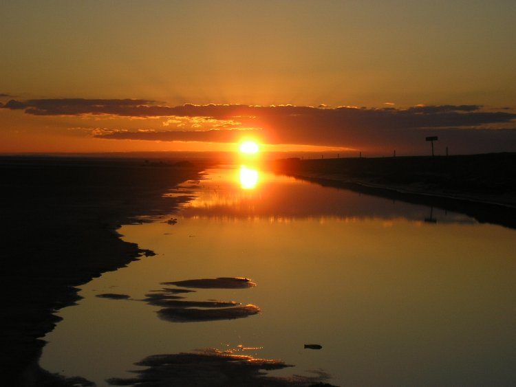 Sunrise at Chott el Djerid, Tunisia